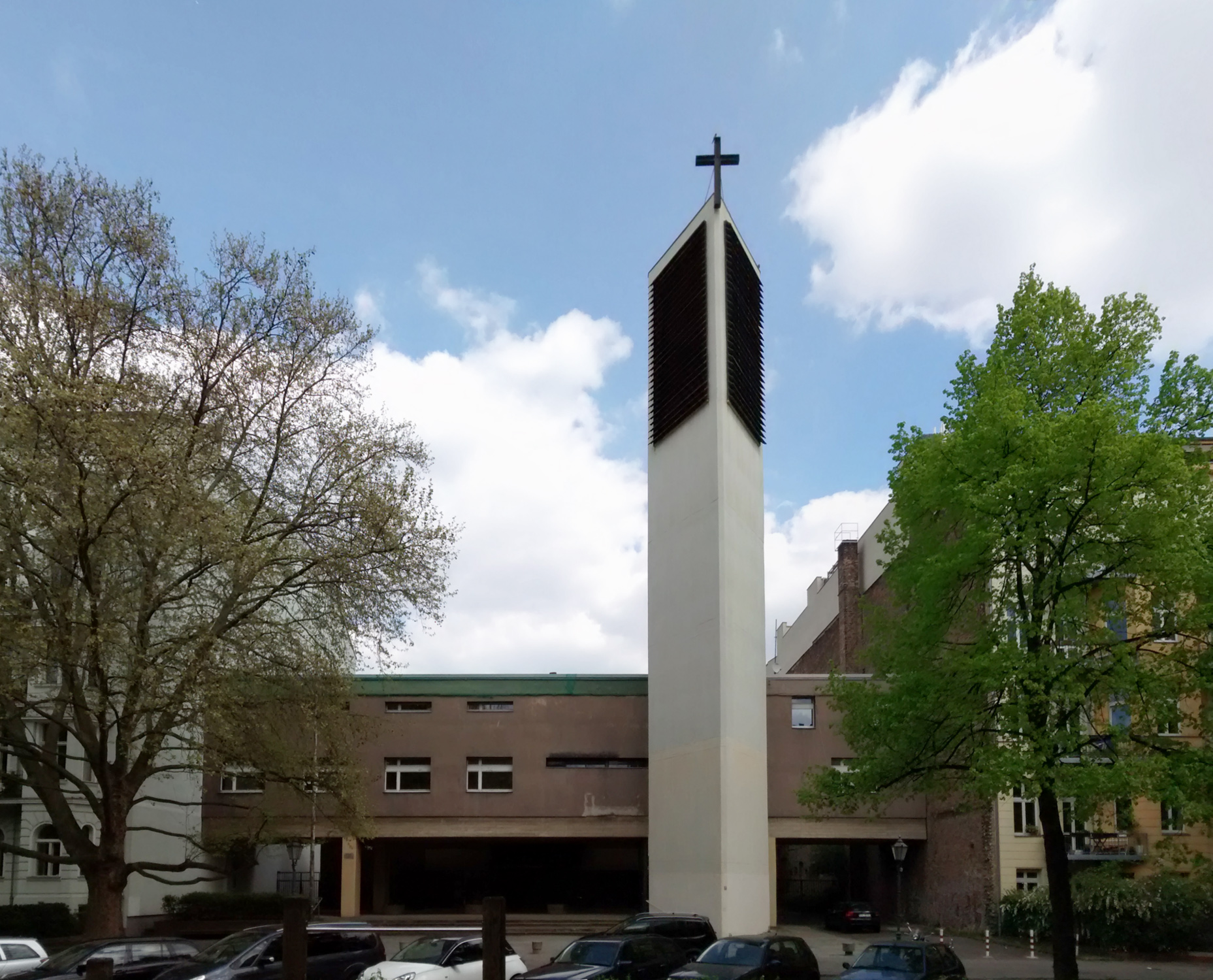 Christus-Kirche, Hornstraße, Berlin-Kreuzberg, Klaus H. Ernst, Mai 2016